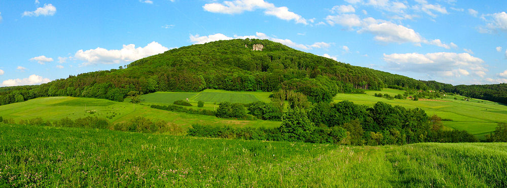 Panoramaaufnahmen vom Glatzenstein